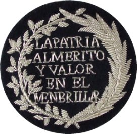 Escudo honorífico otorgado a oficiales tras la batalla de Membrillar.